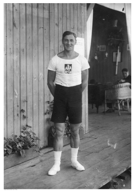 AZS Warszawa - Henryk Niezabitowski, wioślarz i hokeista